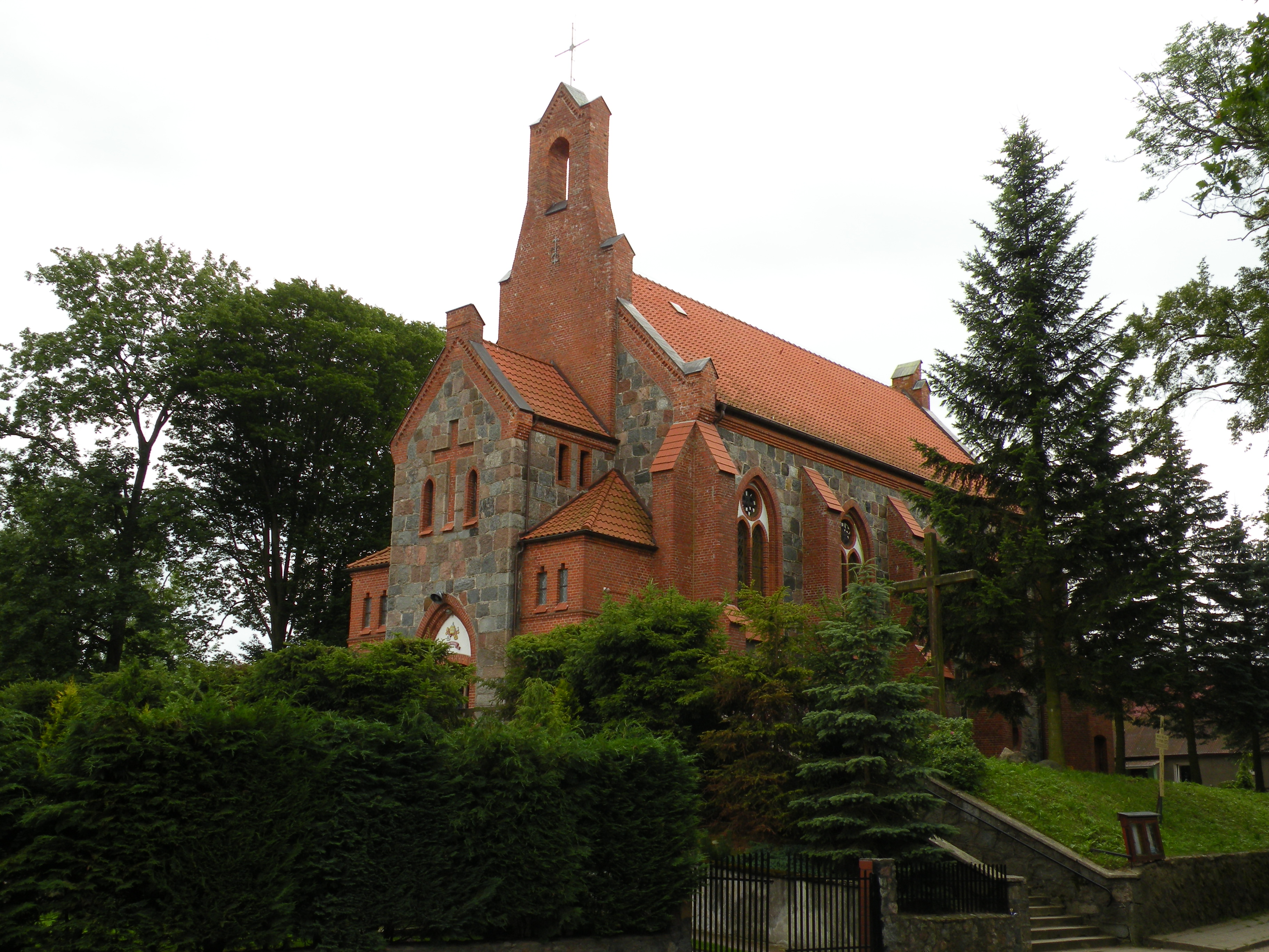 widok ogólny na kościół w Bytowie